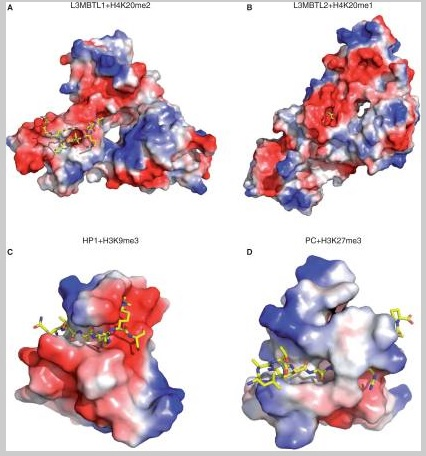 L3MBTL2 utiliza un modo de reconocimiento de inserción en la cavidad para reconocer las histonas metil-lisina. (A) Representación de L3MBTL1 y el complejo estructural H4K20me2 (PDB 2PQW). (B) Representación de L3MBTL2 y el complejo estructural H4K20me1 (PDB 3F70). (C) Representación de HP1 y el complejo estructural H3K9me3 (PDB 1KNE). (D) Representación de Pc y el complejo estructural H3K27me3 (PDB 1PFB).